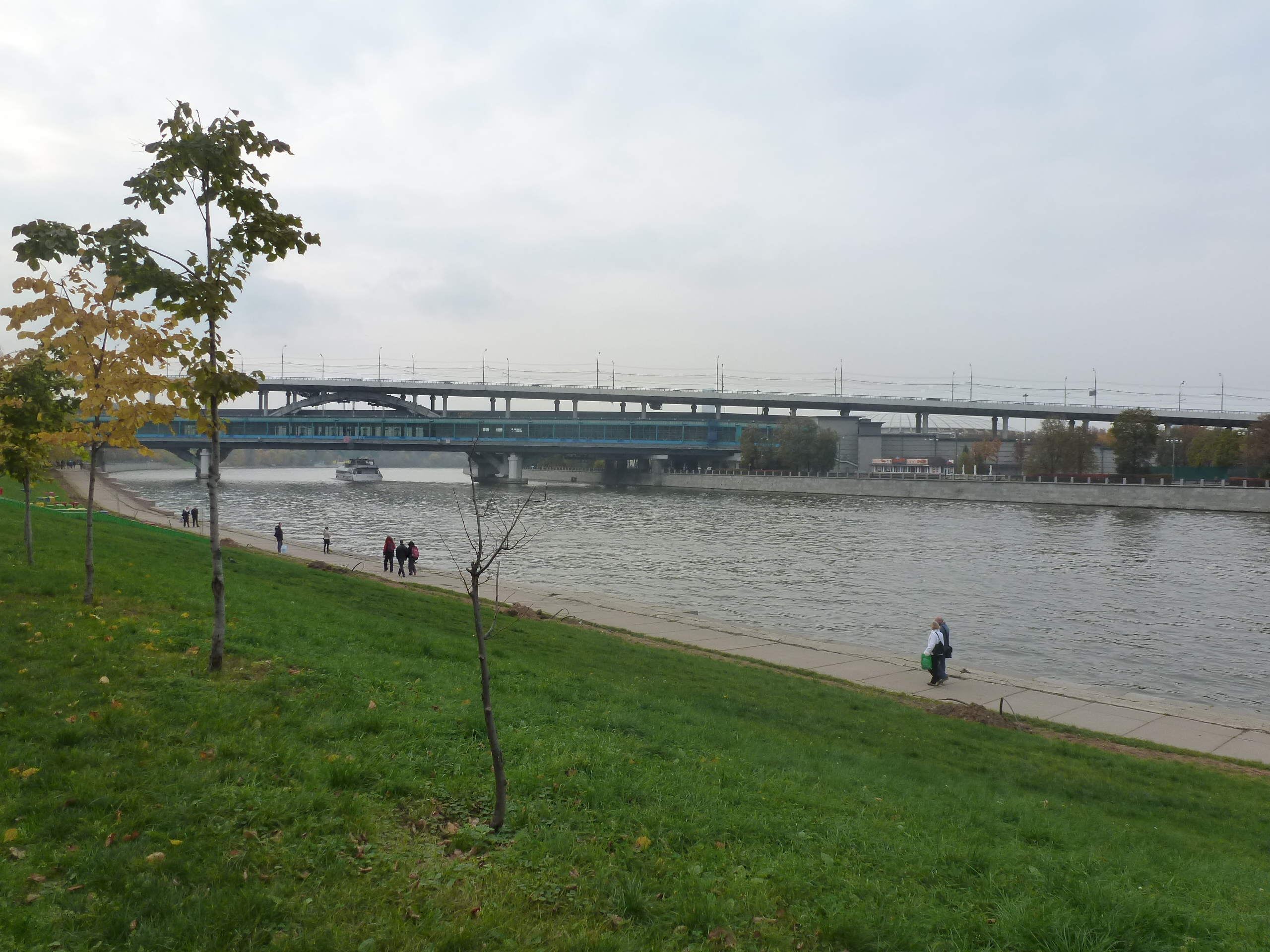 Moskva-rivero kaj metroponto, vido de la Andrea riverbordo (parko Montoj Vorobjovi)